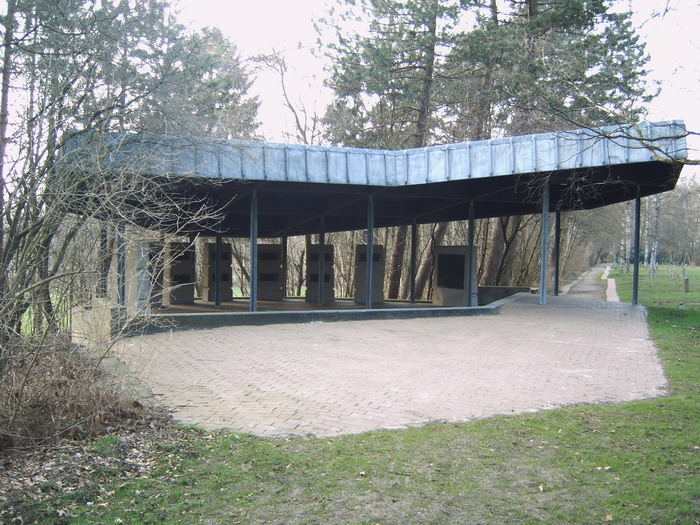 Halle mit Gedenksteinen für die Emslandlager, Friedhof Bockhorst/Esterwegen